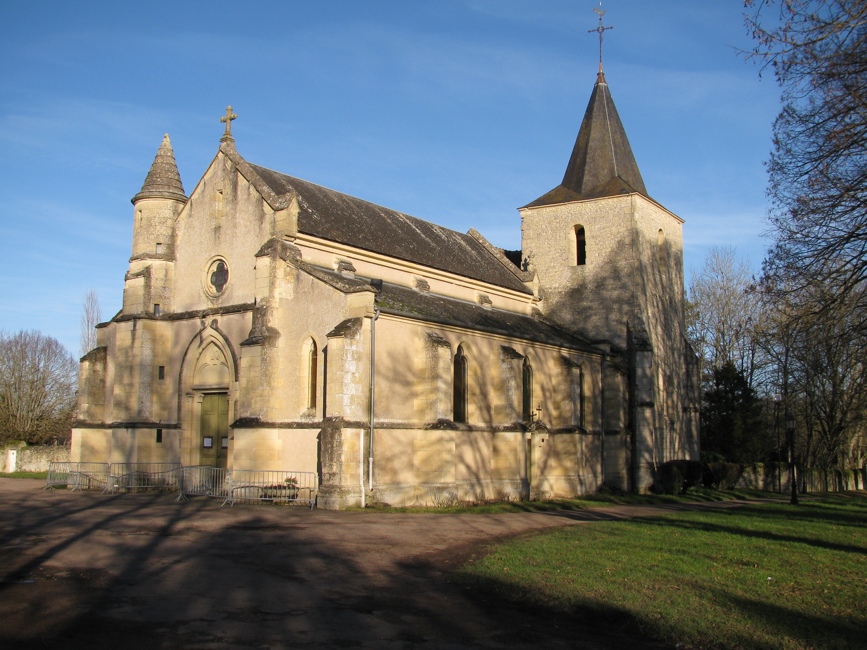 Église Saint-Denis, à Urzy, Nièvre, France